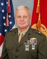 Major General Paul E. Lefebvre